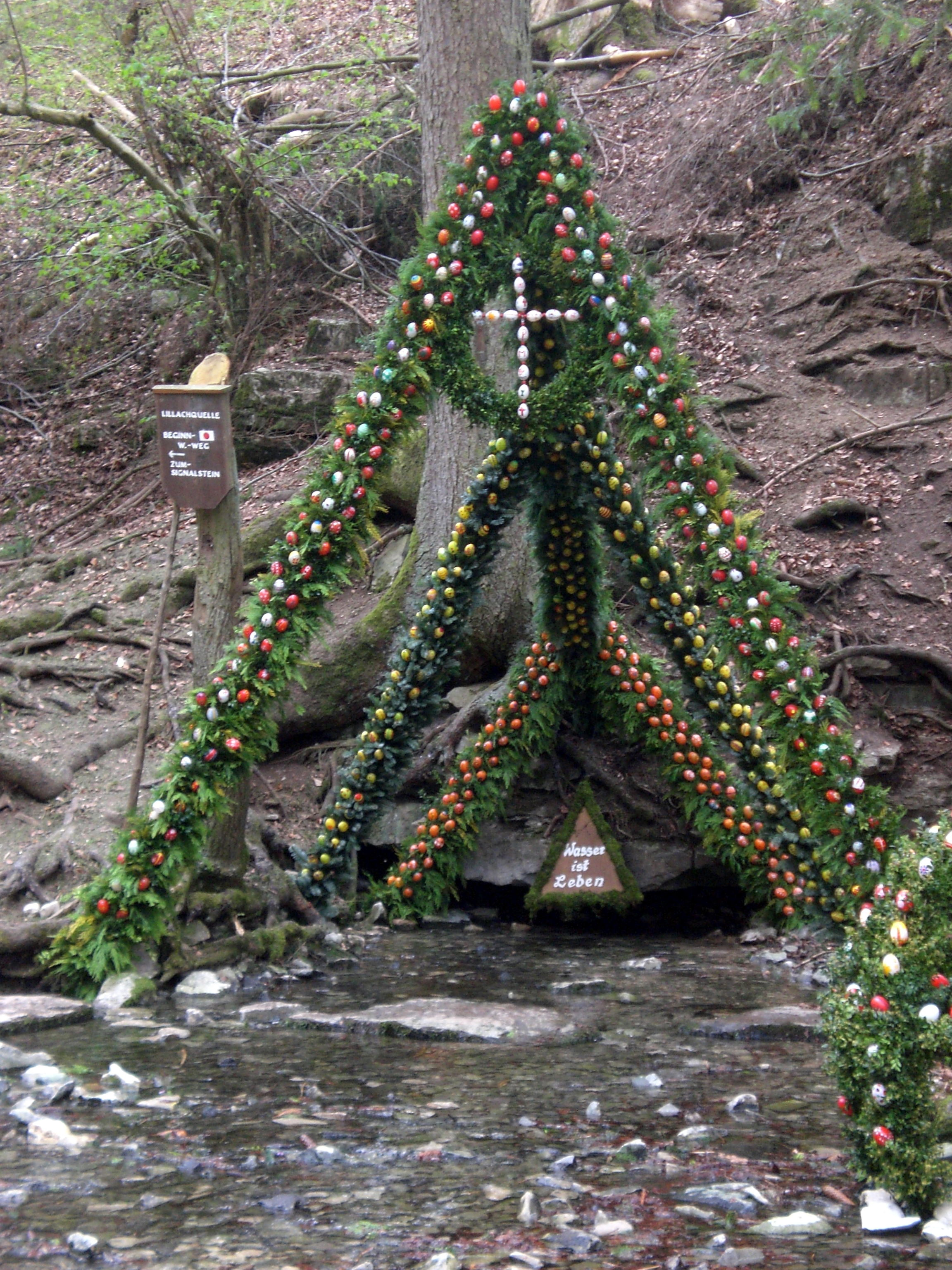 Lillach. Quelle mit Osterschmuck